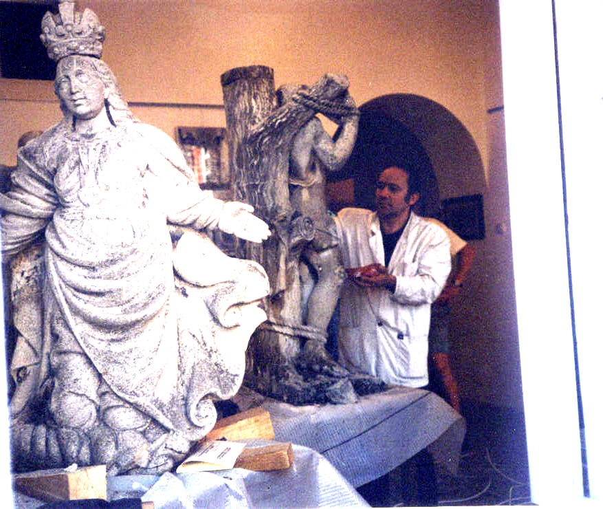 Barockes Friedhofsportal in Kaisersteinbruch, Ferenc Gyurcsek restauriert die Skulpturen